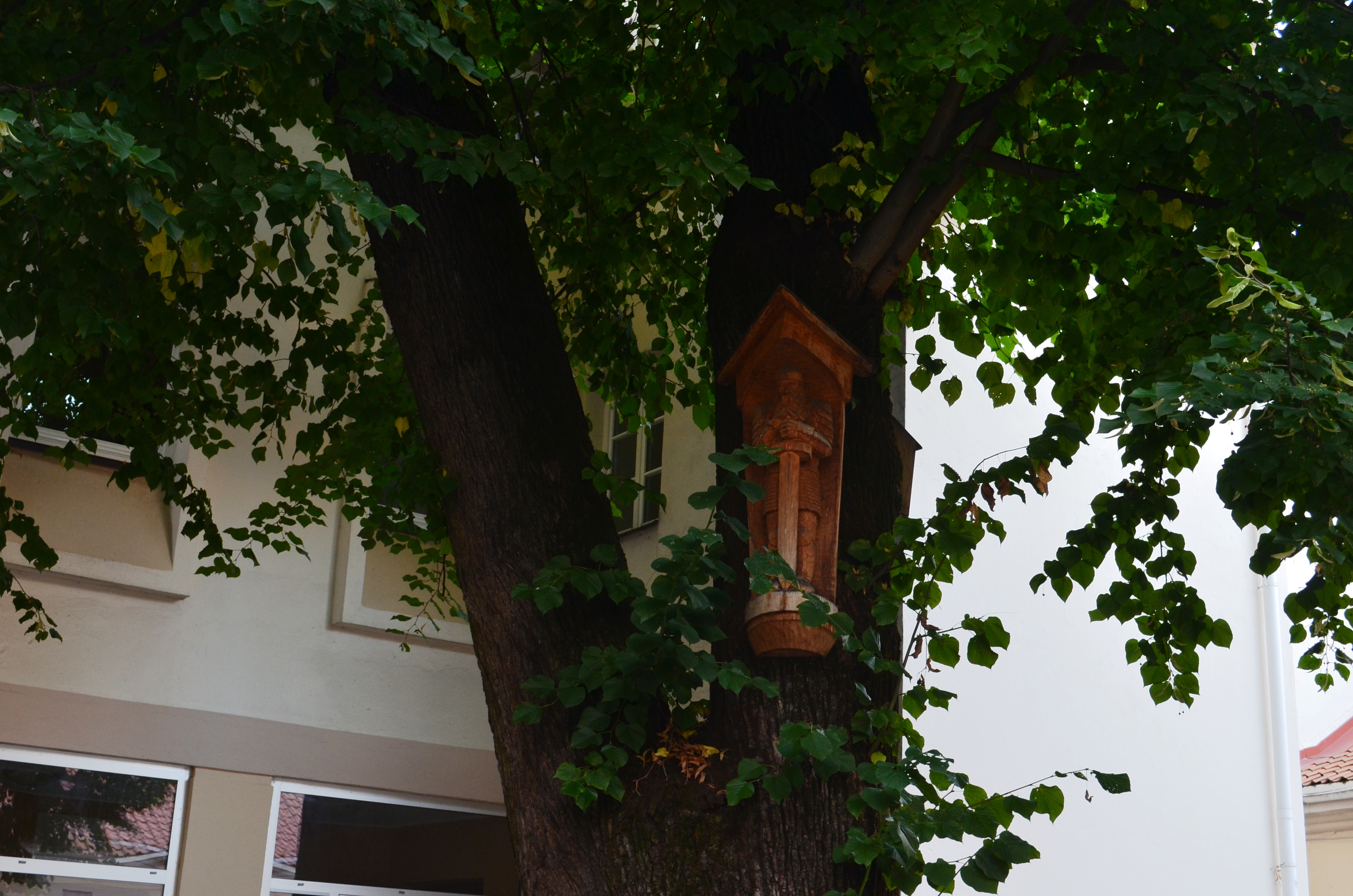 Saugoma liepa, VU M. Daukšos kieme